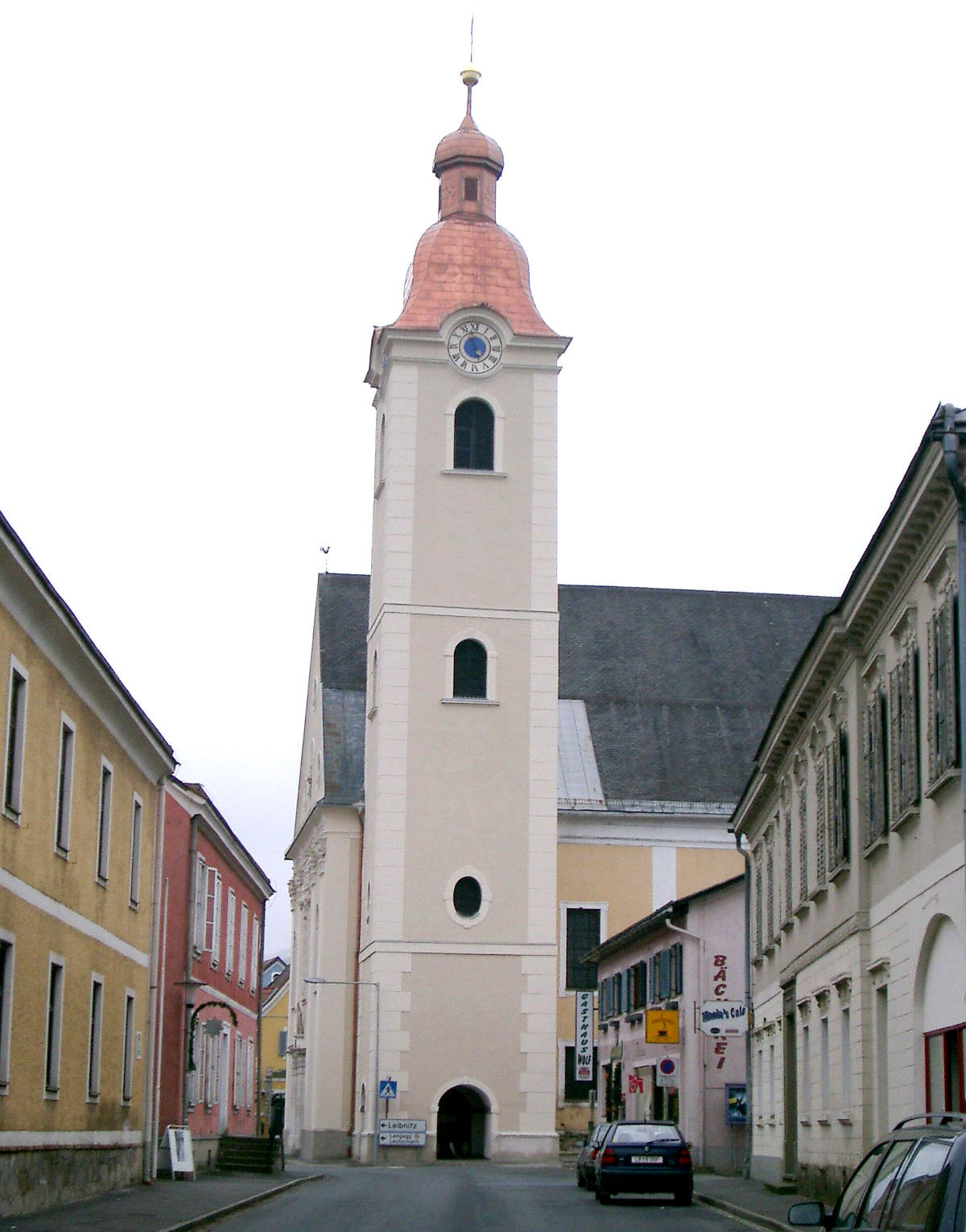 Kath. Pfarrkirche Mariä Geburt